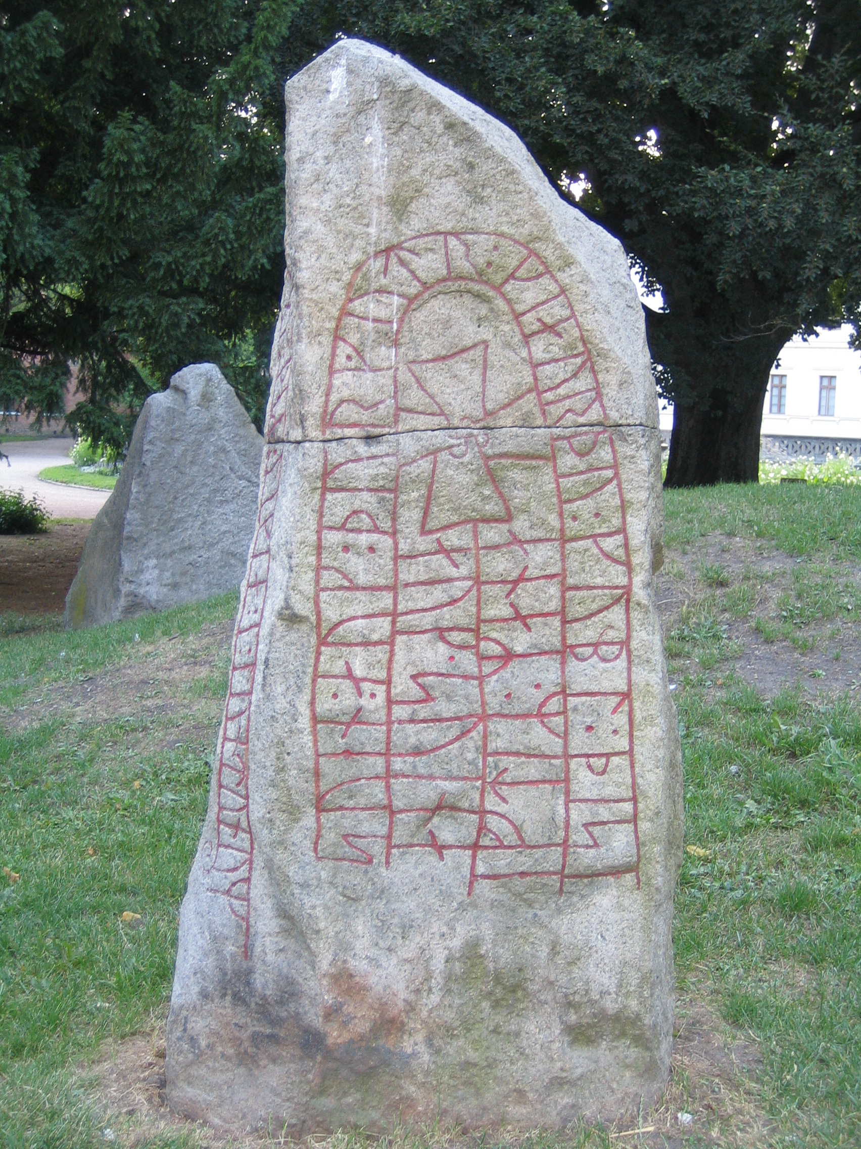 Vallebergastenen, runstenskullen i Lundagård, signum DR 337.